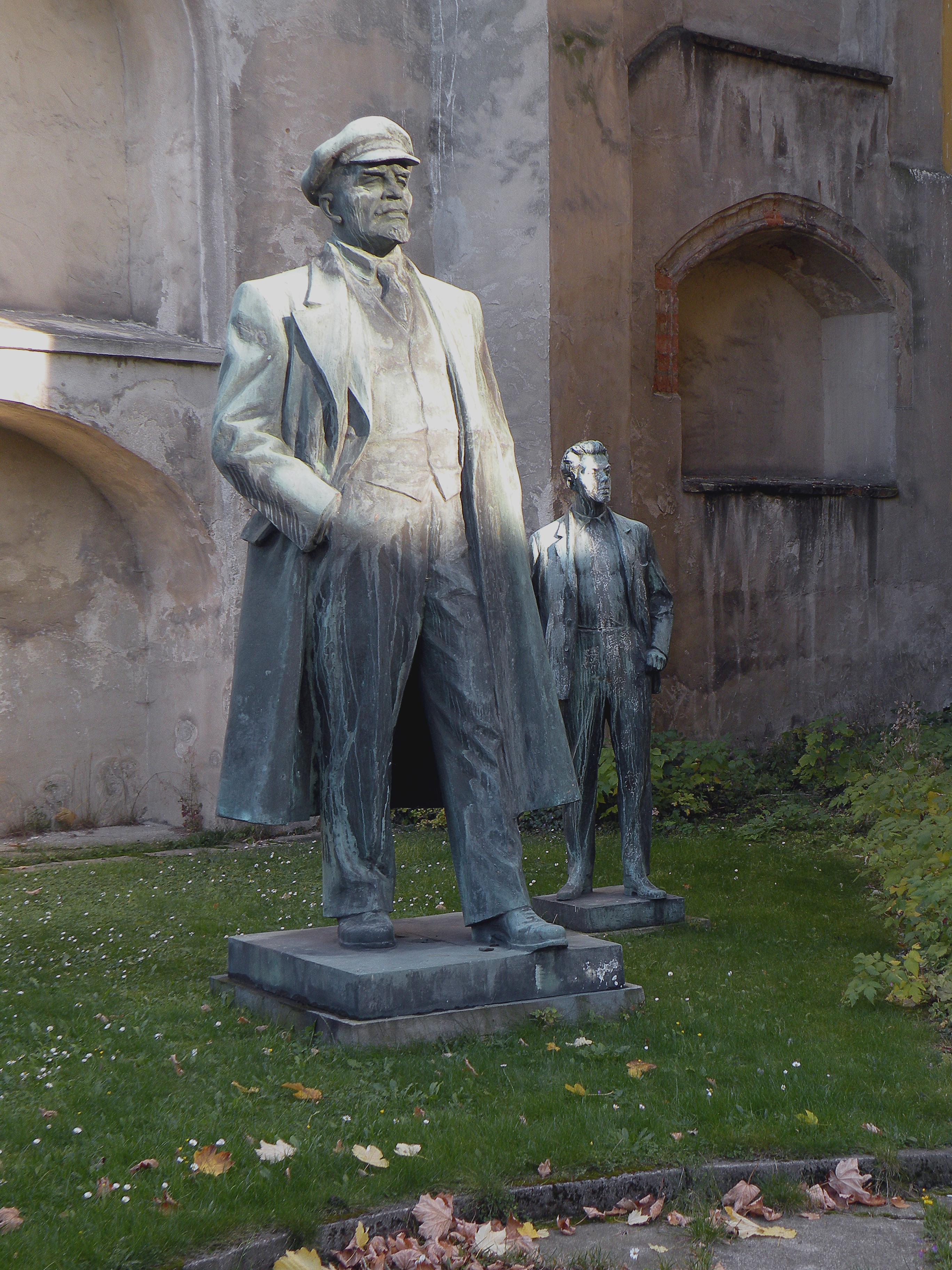 Ленин и Готвальд.